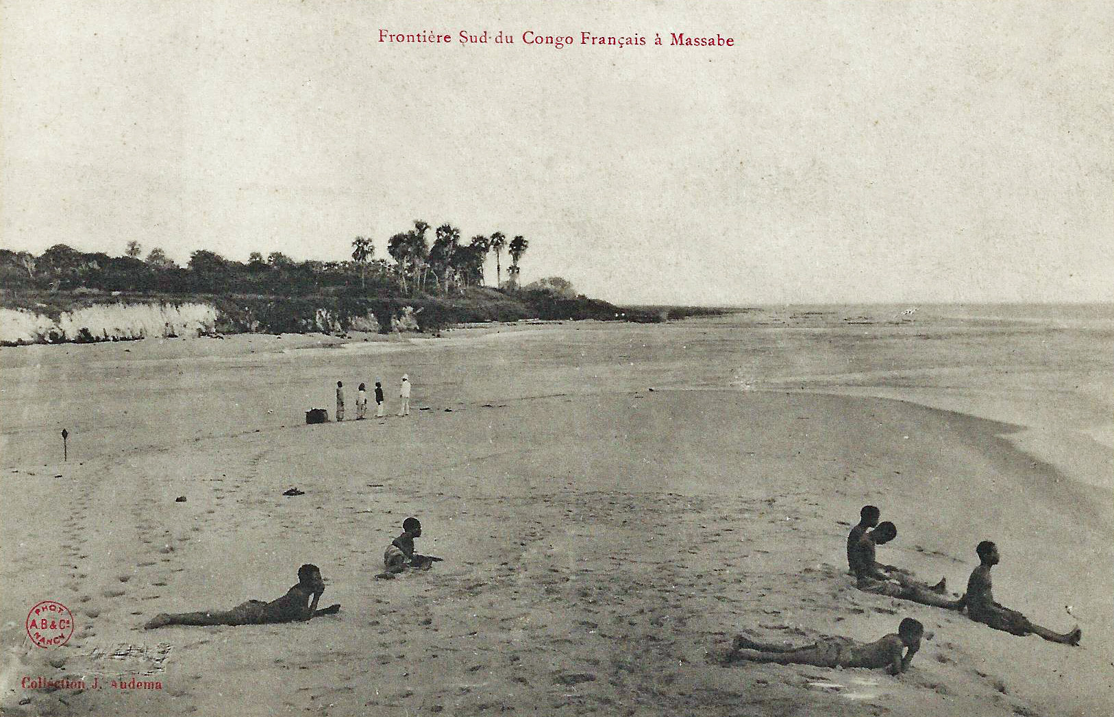 Frontière Sud du Congo Français à Massabe. Collection J. Audema. Phot. A.B. & Cie, Nancy [Albert Bergeret] Congo Français